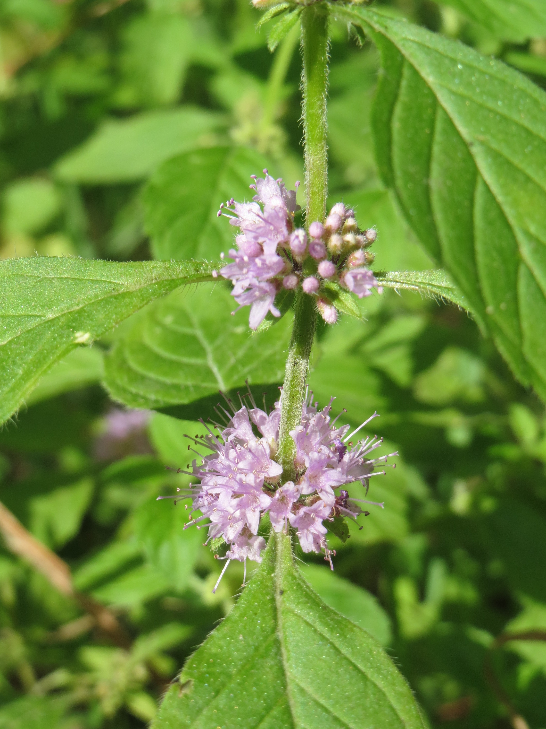 Ackerminze (Mentha arvensis) im Schwetzinger Hardt